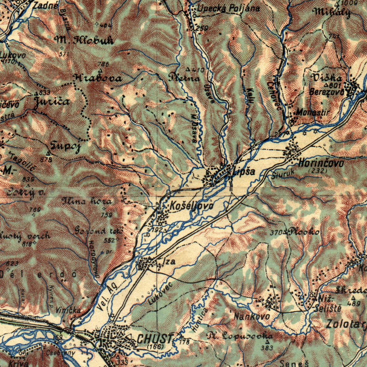 Вузькоколійна залізниця Хуст-Медвежий на карті 1925 року